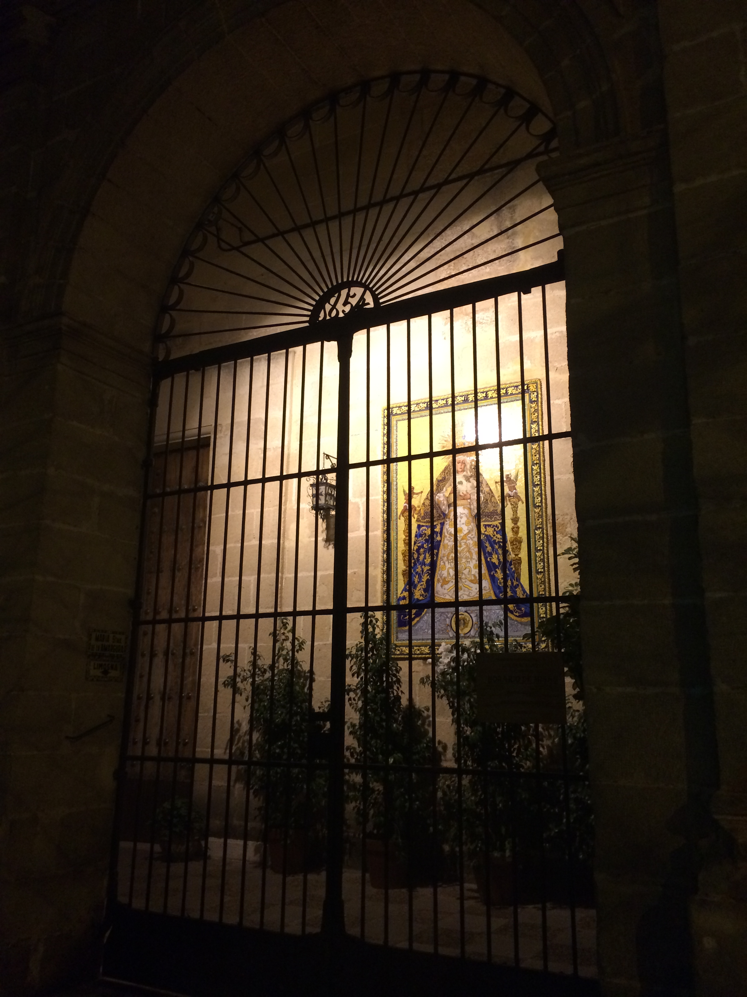 Amargura mosaico